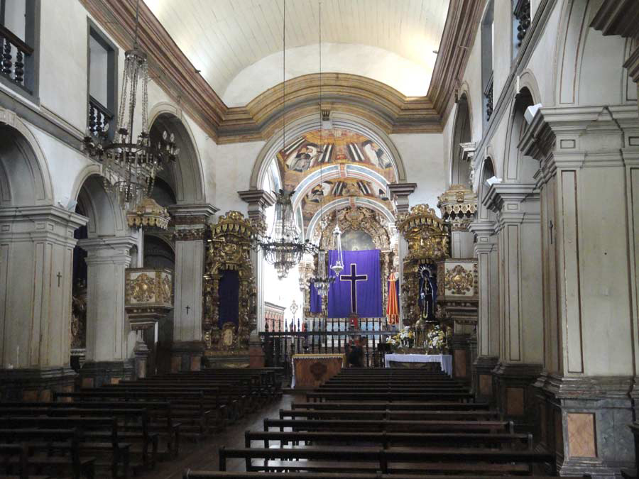 Catedral Basílica Nossa Senhora da Assunção.